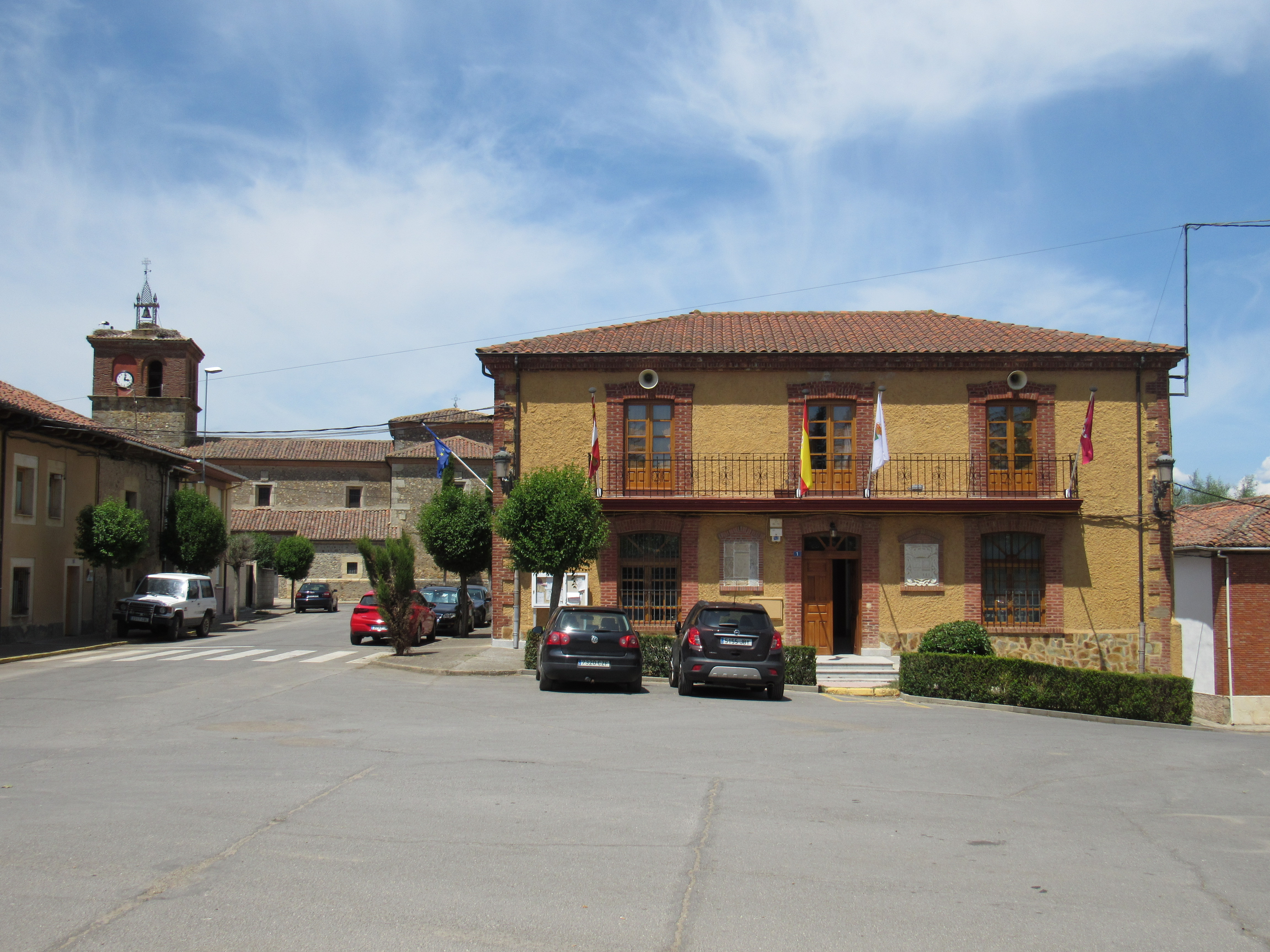 Ayuntamiento e Iglesia de Vegas del Condado (León)